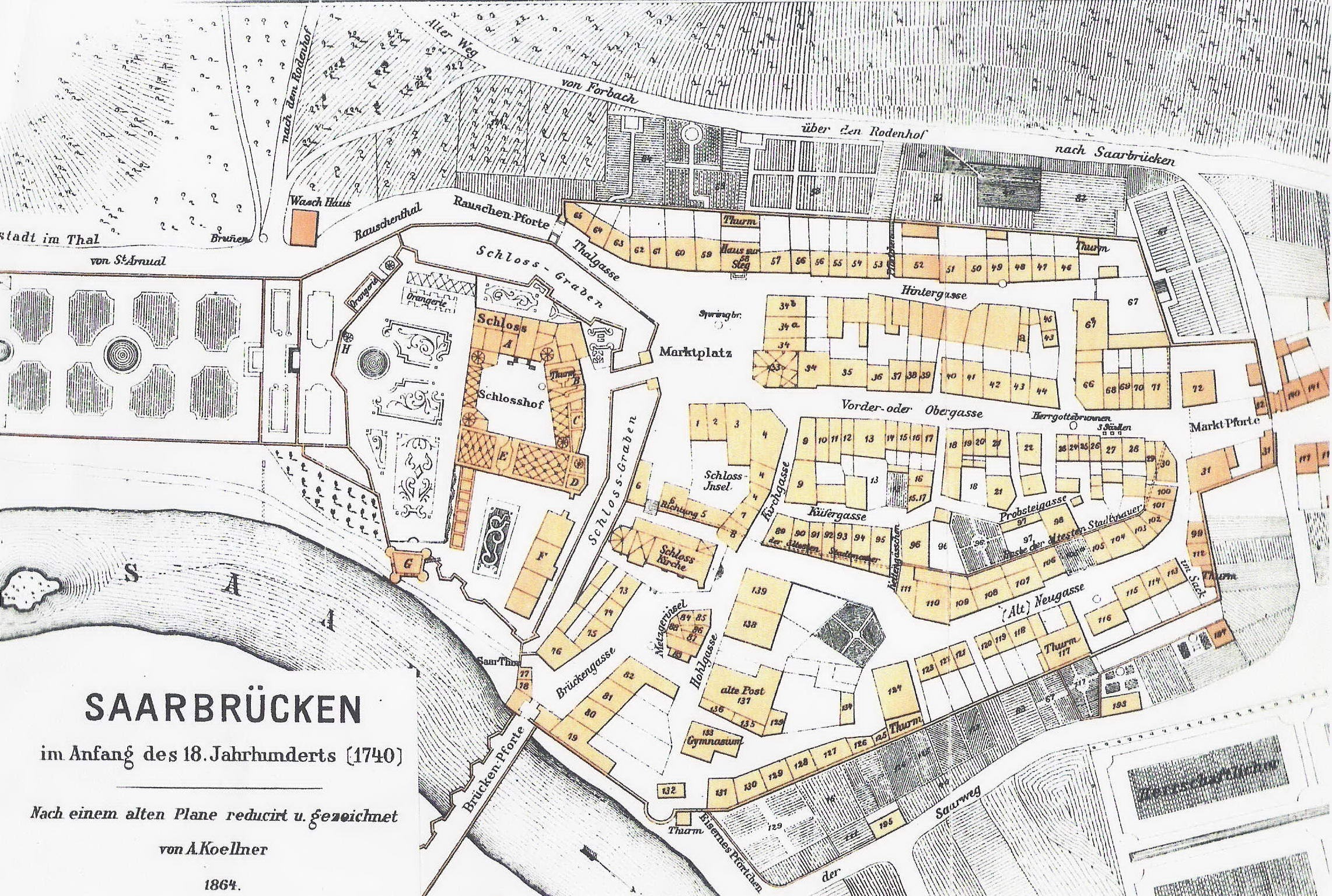 Die Stadt Saarbrücken Anfang des 18. Jahrhunderts, gezeichnet nach einem Plan von 1740, Adolph Köllner 1864